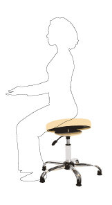 Проекционная схема посадки на стуле с подвижной поверхностью.